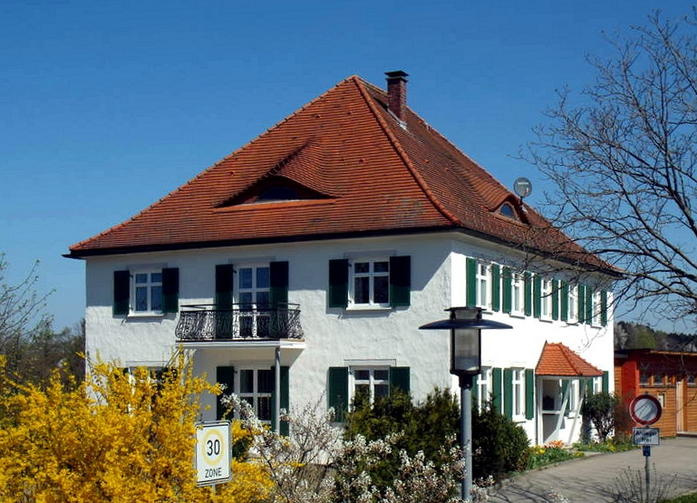 Weißensberg